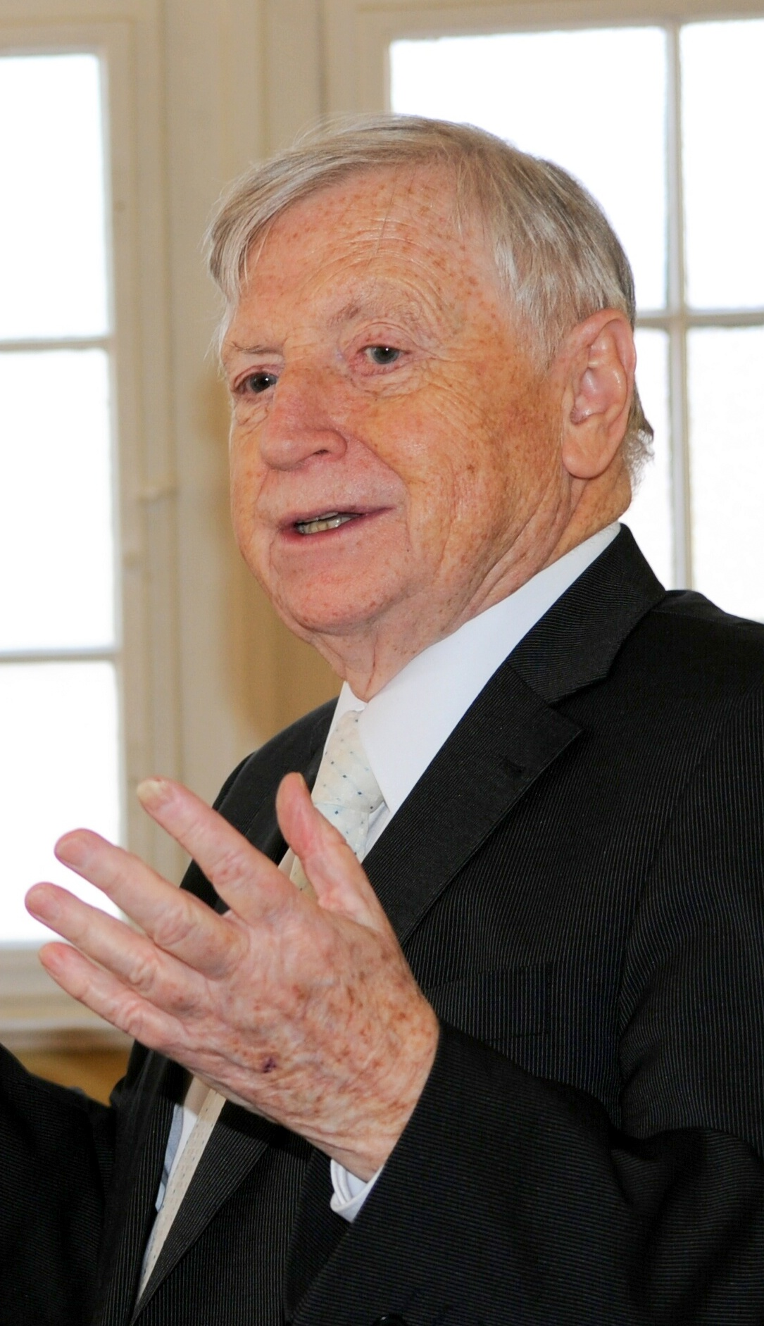 Porträt Günter Krusche von 2011